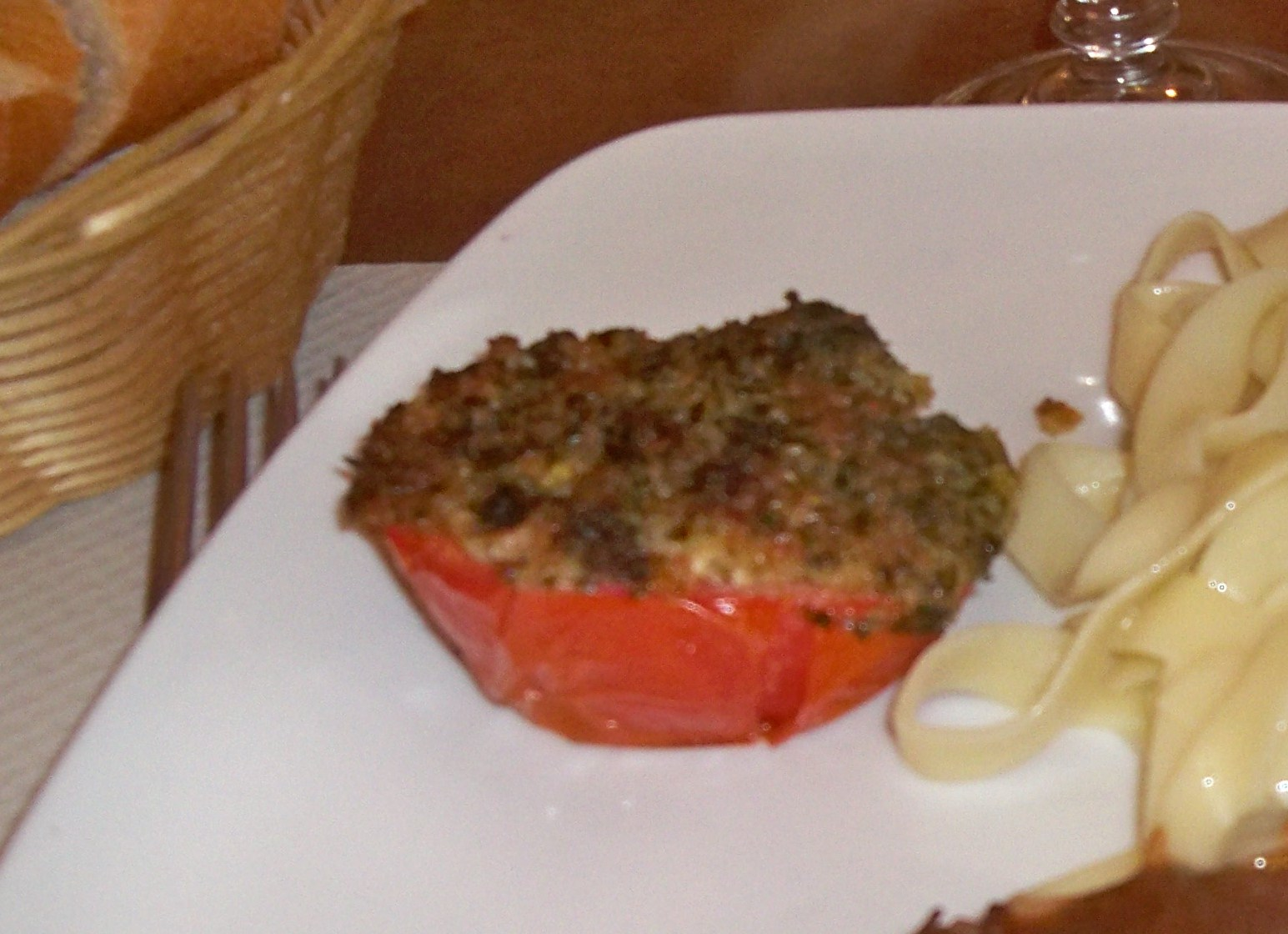 Tomate à la Provençale